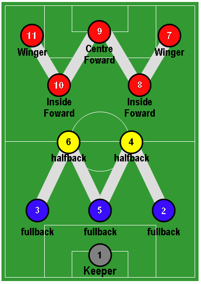 mia creazione